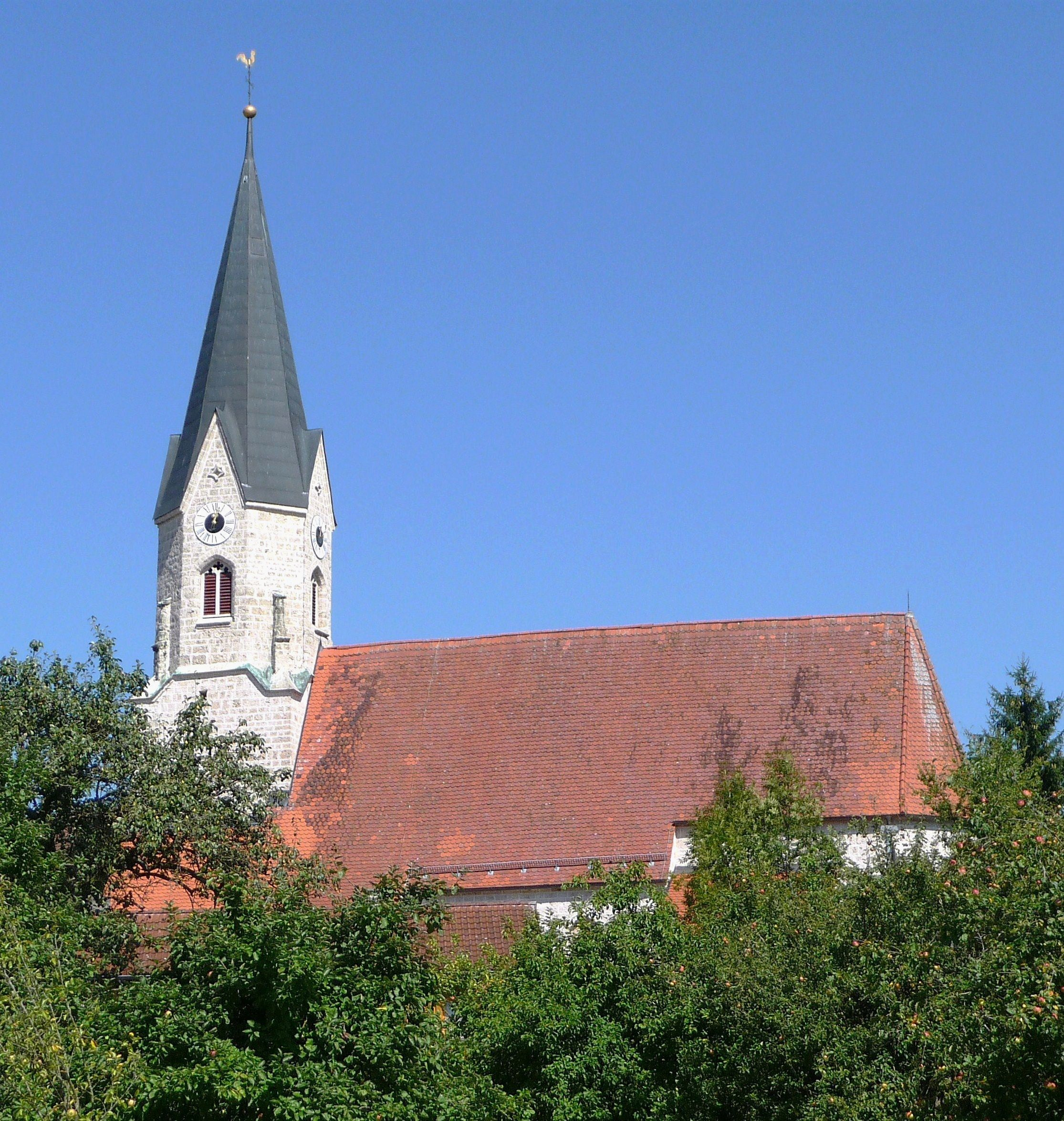 Die Pfarrkirche St. Mauritius in Münchham